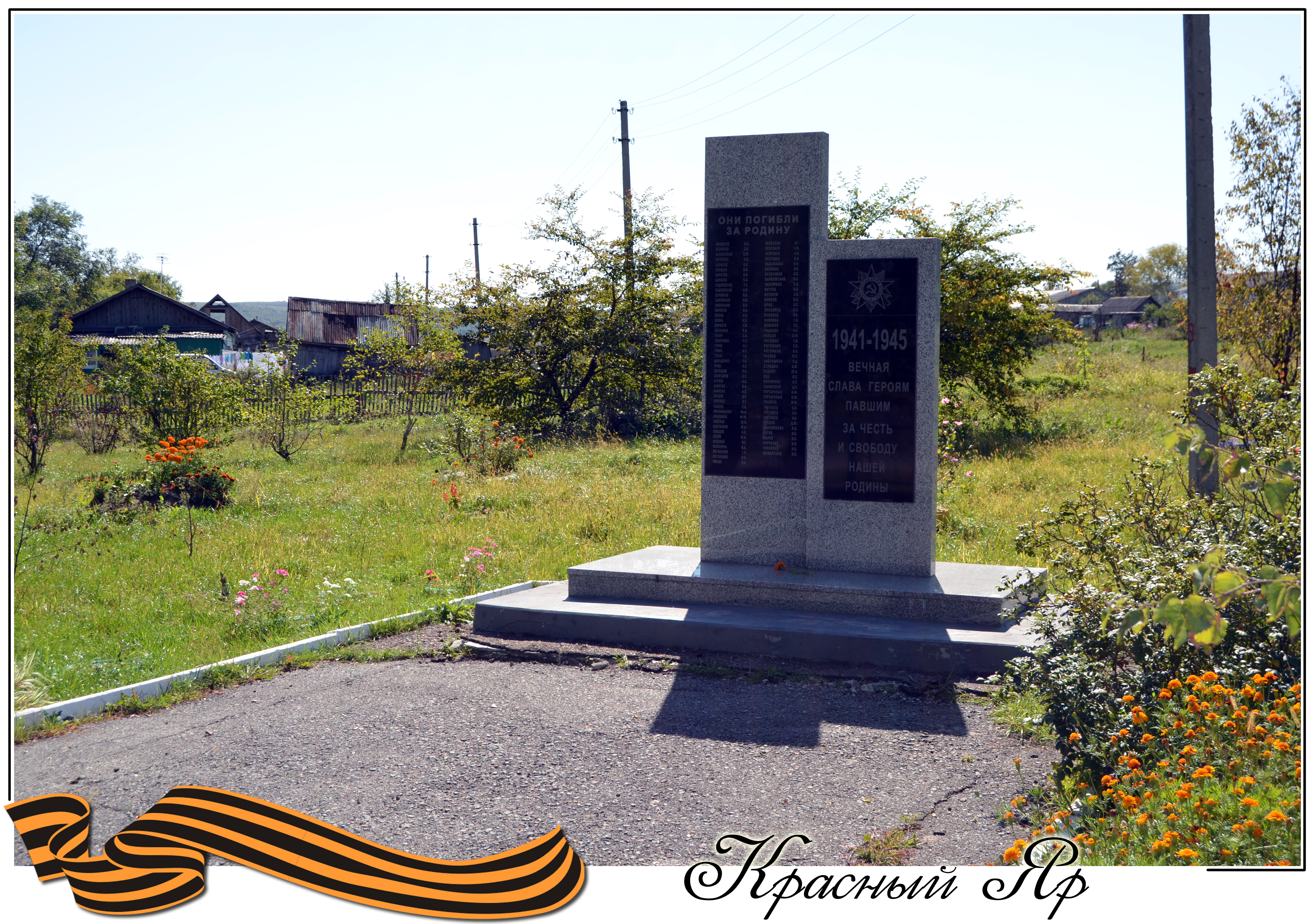 Памятник односельчанам, погибшим в годы Великой Отечественной войны 1941-1945.